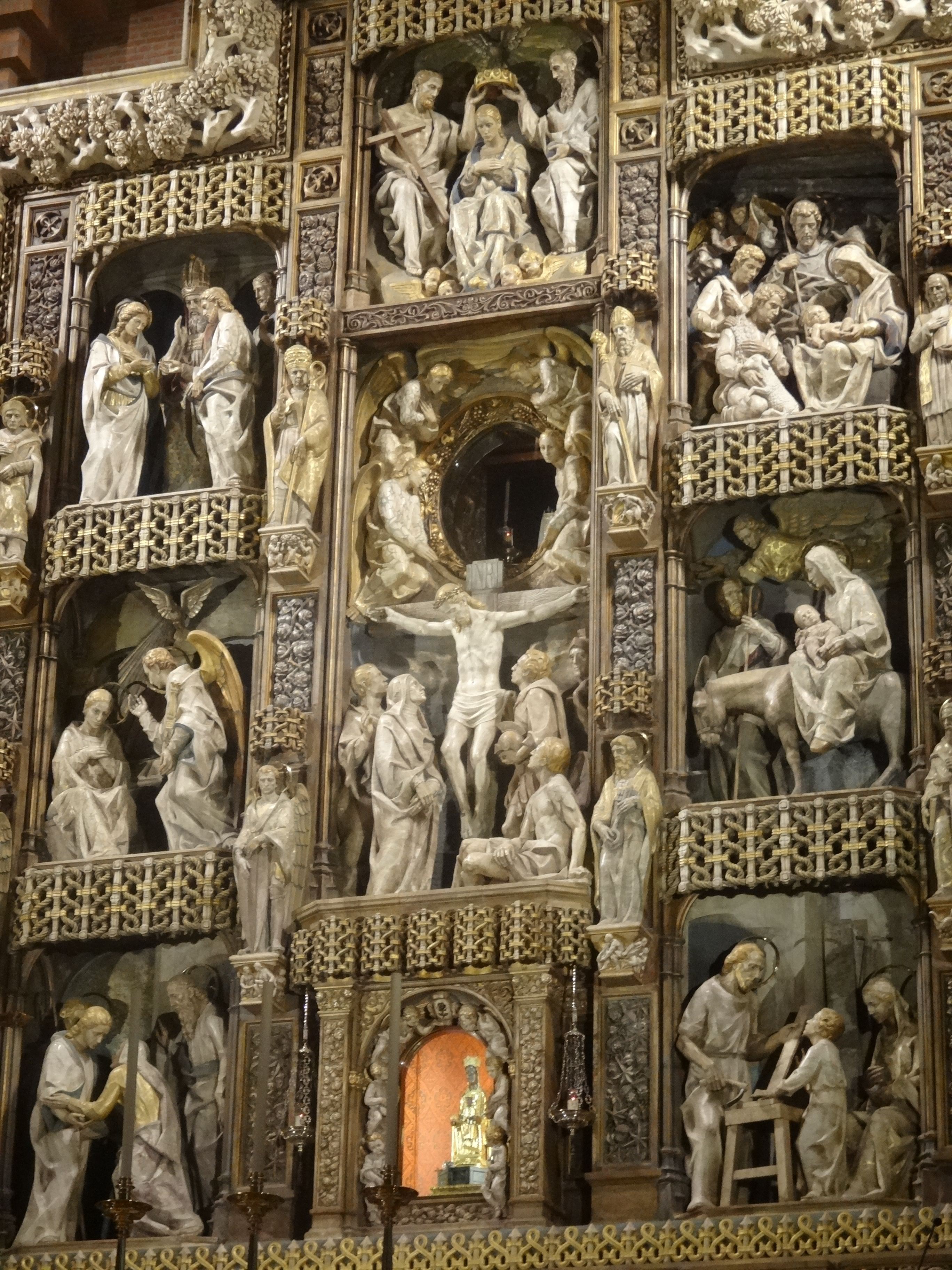 Santuari de Torreciutat.